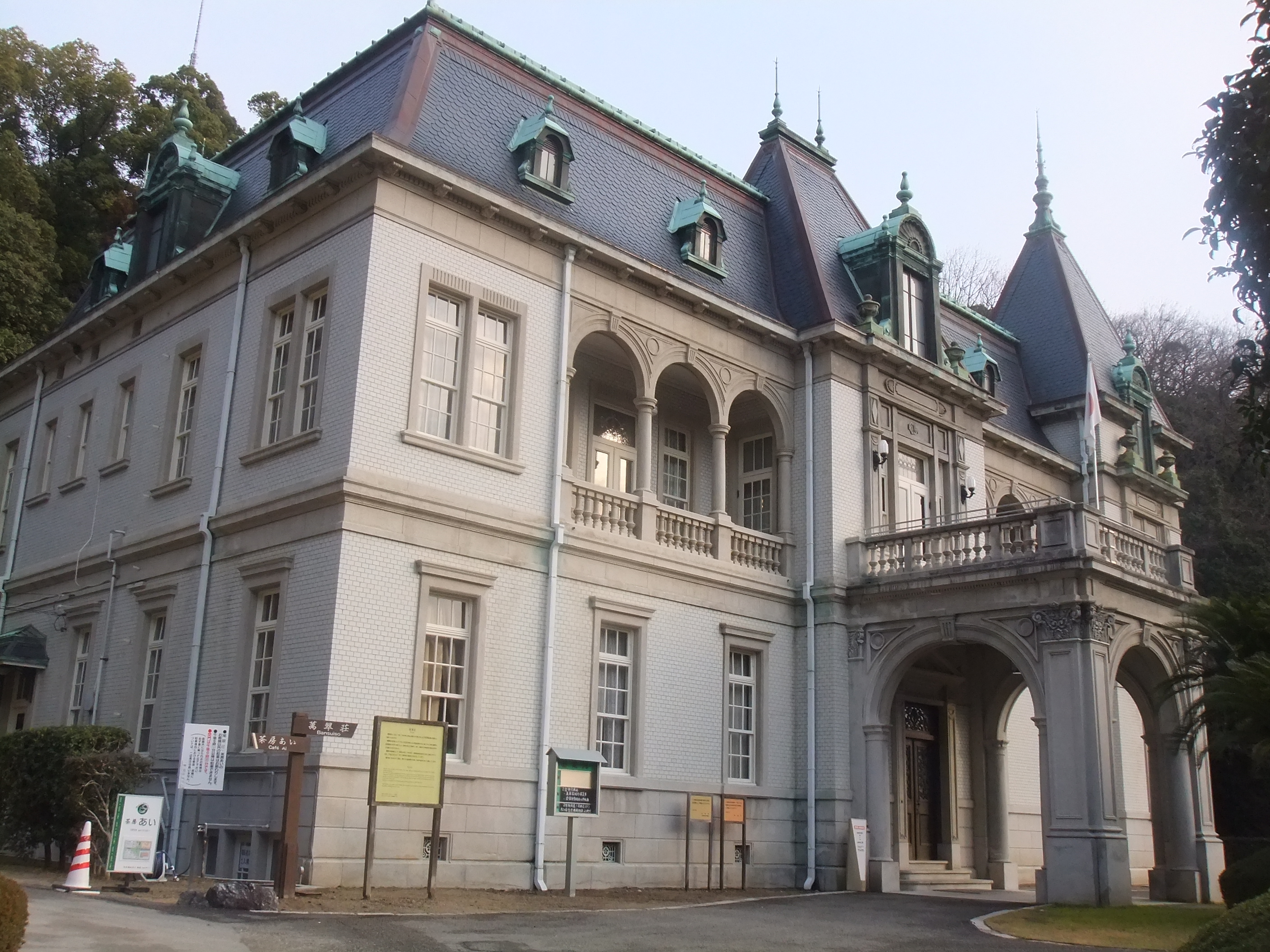 萬翠荘 建物の様子